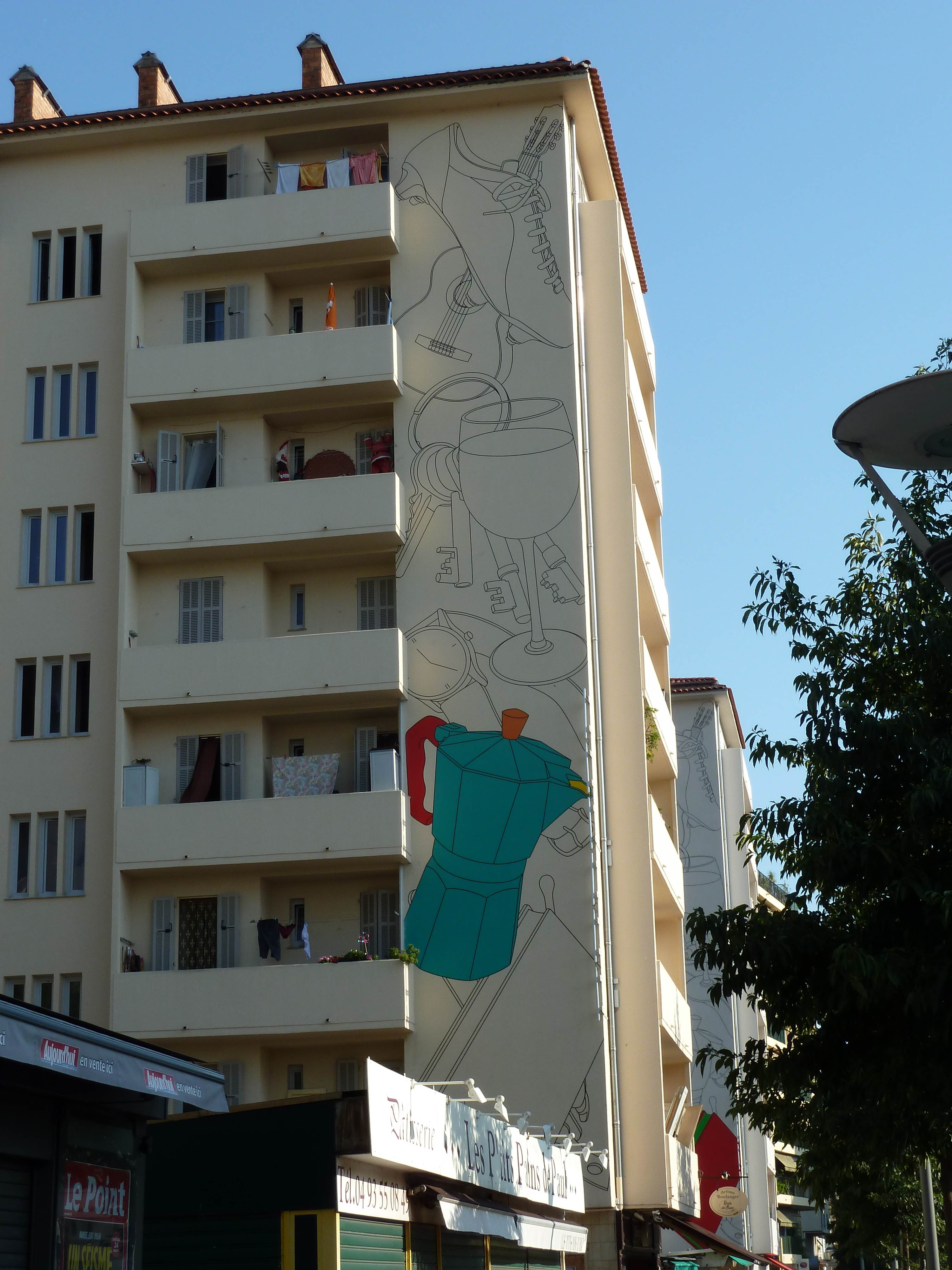 Œuvre "Cascade d’objets" de Michael Craig Martin